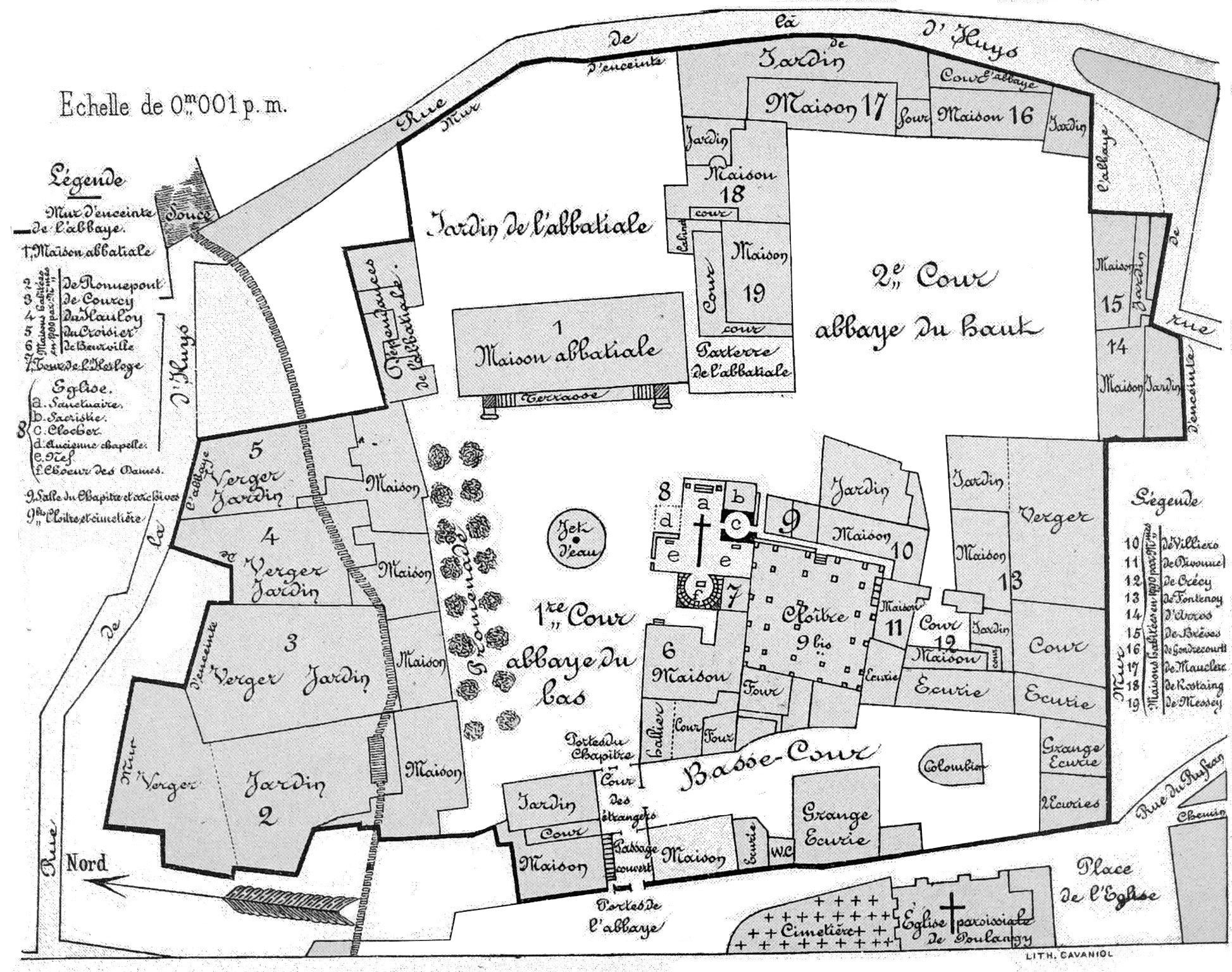 sur un cahier de dessins de Pernot.